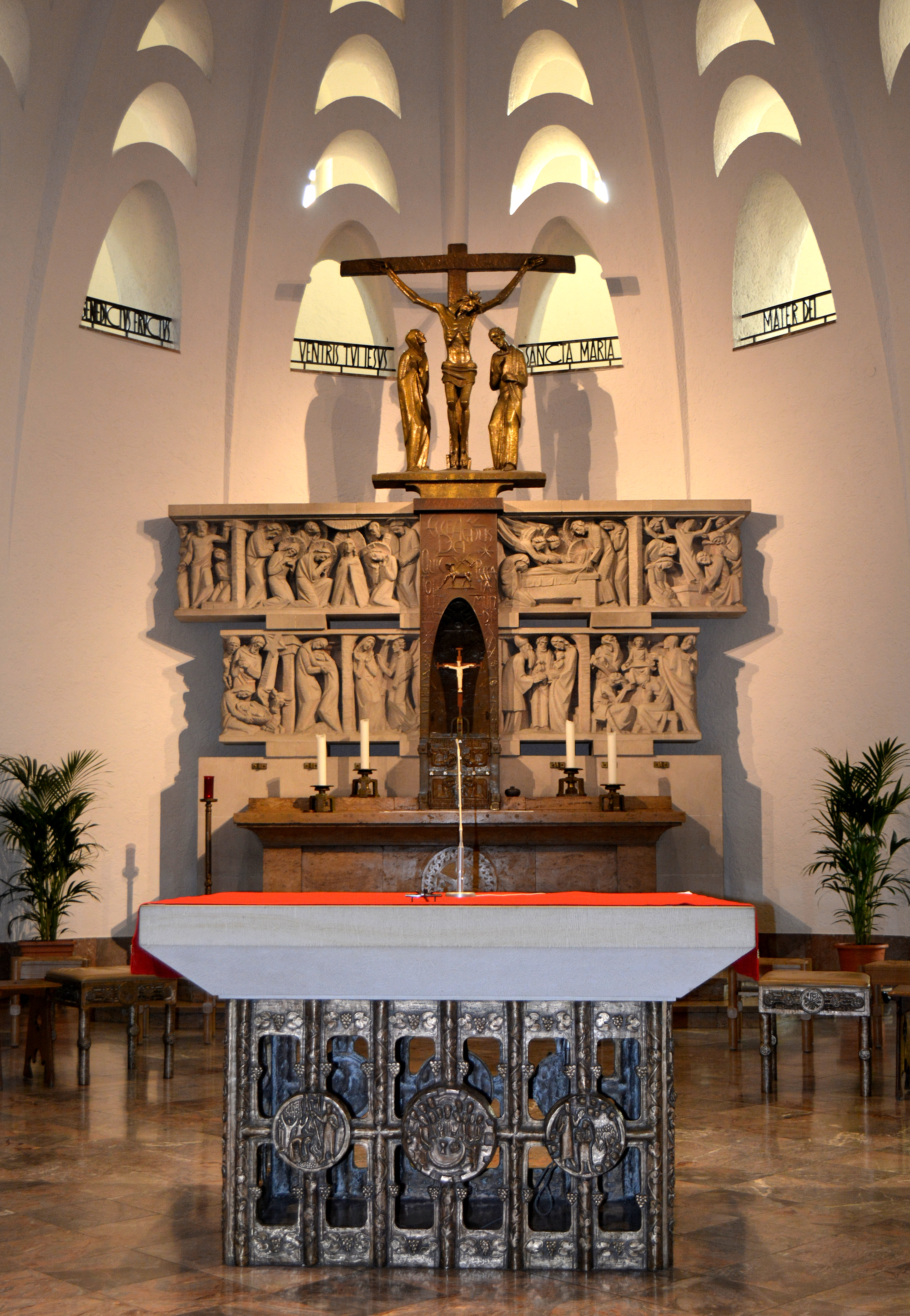 Limburg an der Lahn, St. Marien, Hochaltar